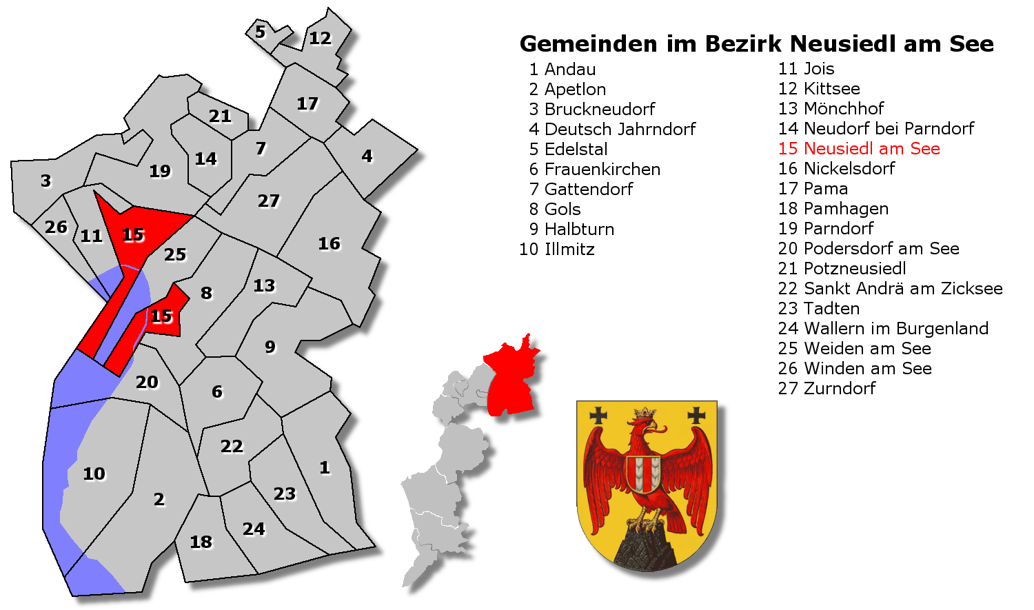 Gemeindekarte Bezirk Neusiedl am See (Burgenland, Österreich)